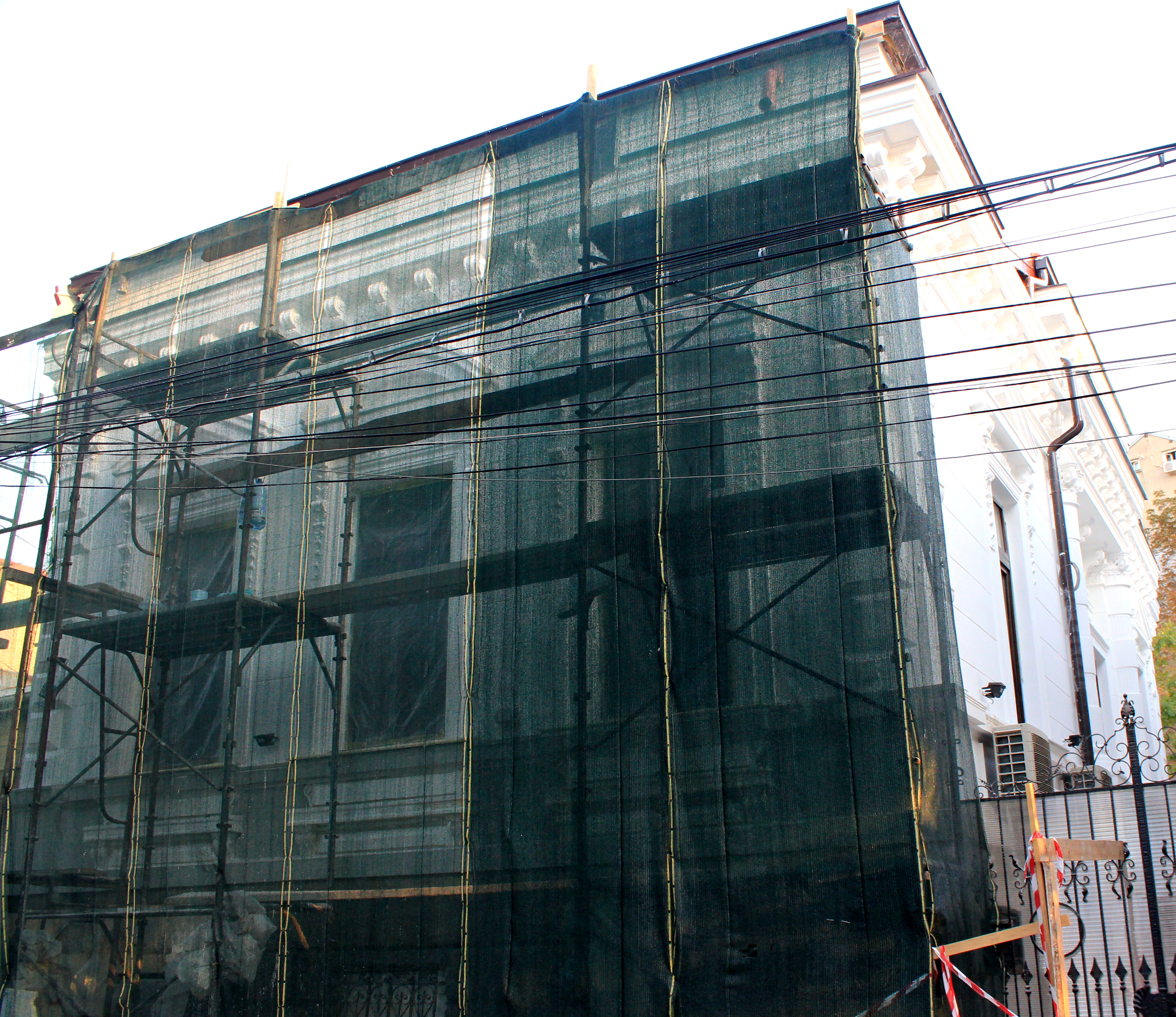 Casă Plantelor 40 in renovare